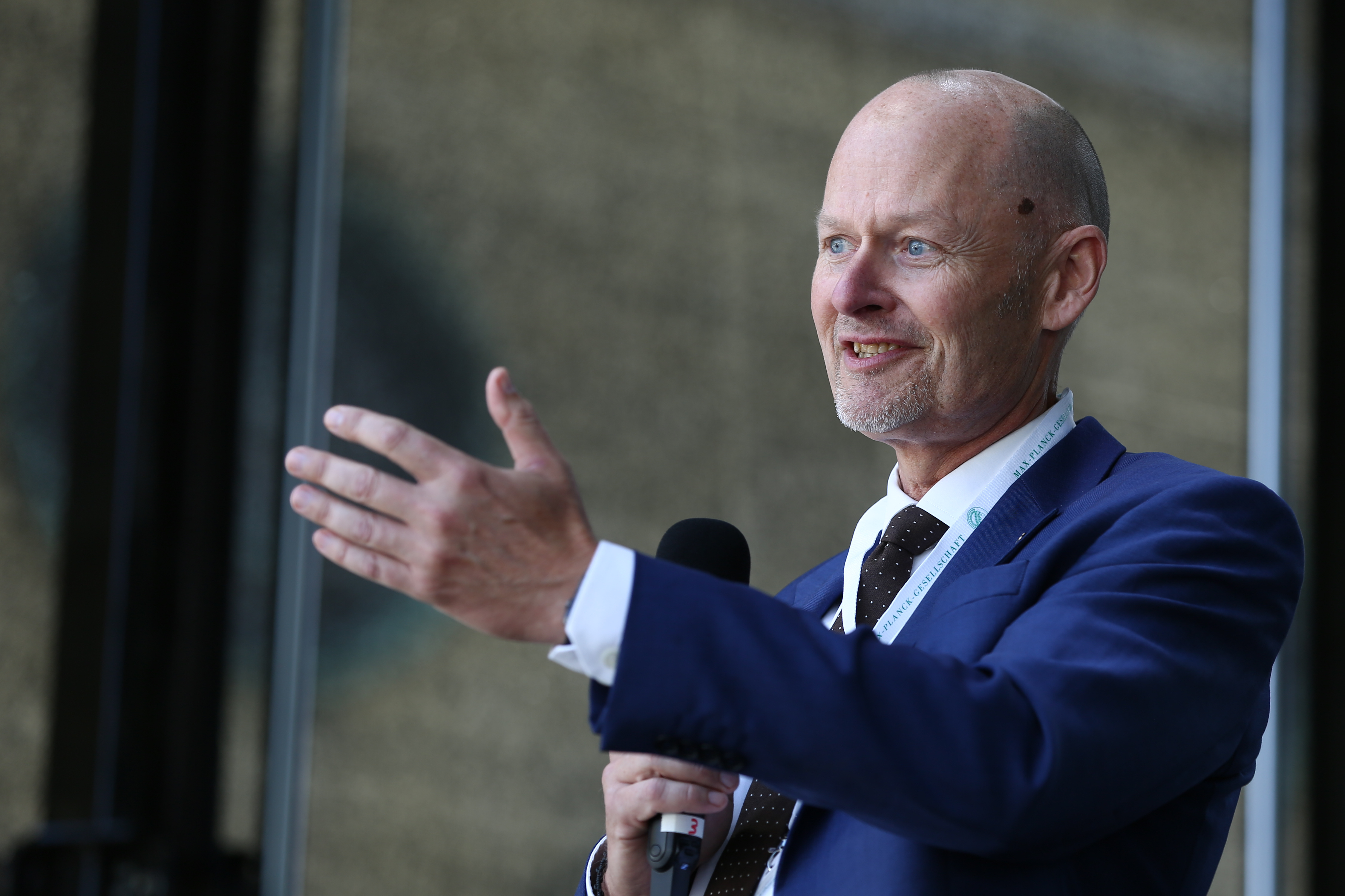 Bill Hansson, Vize-Präsident der Max-Plack-Gesellschaft am Max-Plack-Tag in München, 2018-09-14